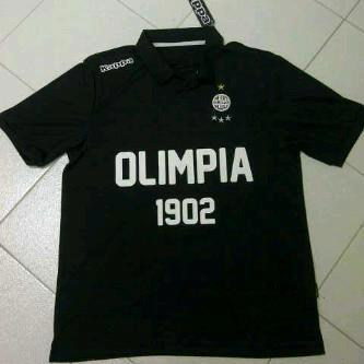 Casaca conmemorativa del Club Olimpia de Paraguay que evoca la primera utilizada por el equipo en 1902, idea de su fundador William Paats.